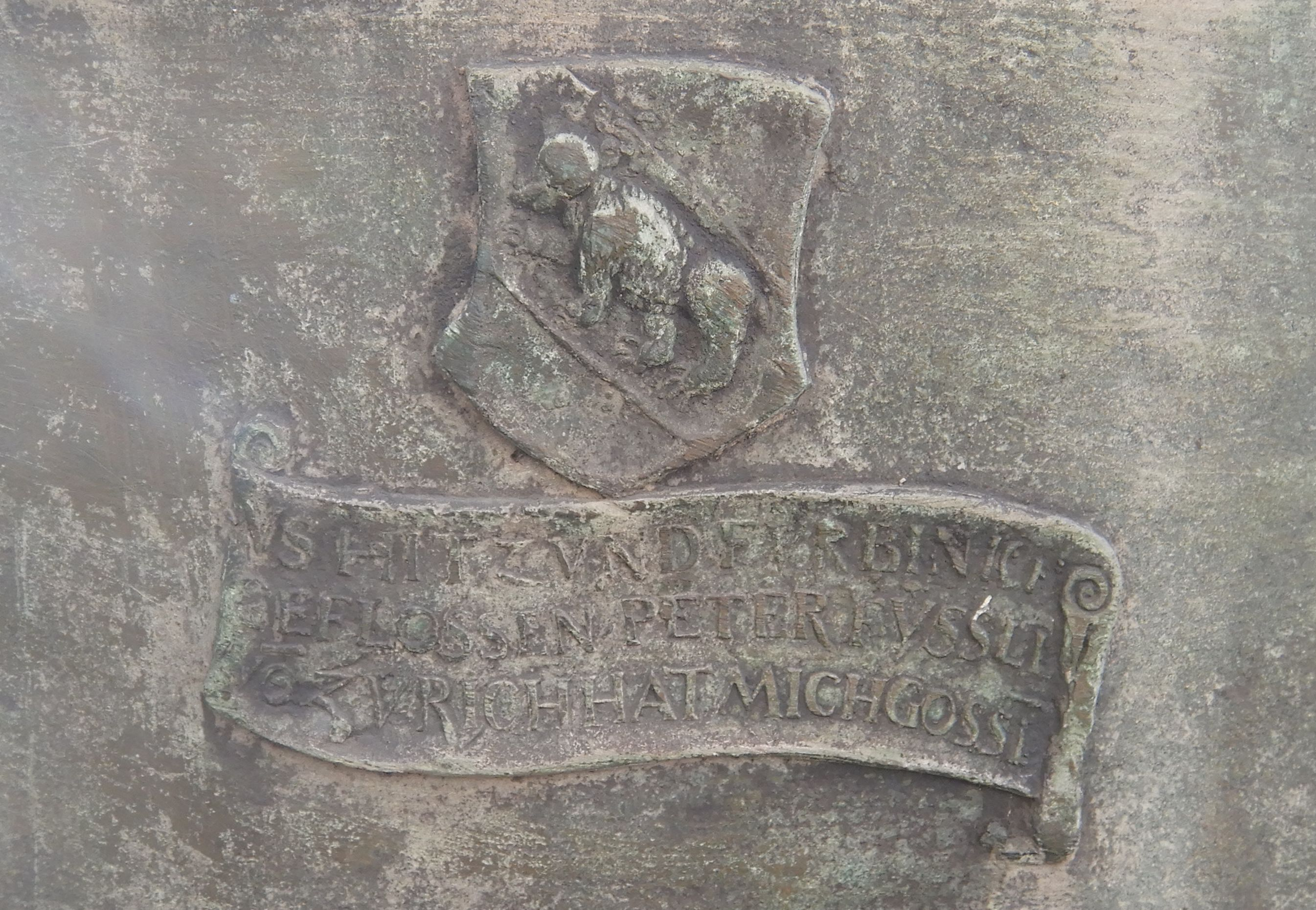 Text auf der Rückseite der ersten Glocke (1663) der Reformierten Kirche Densbüren: VS HITZ VND FÜR BIN ICH GEFLOSSEN PETER FÜSSLI VO ZÜRICH HAT MICH GOSSE